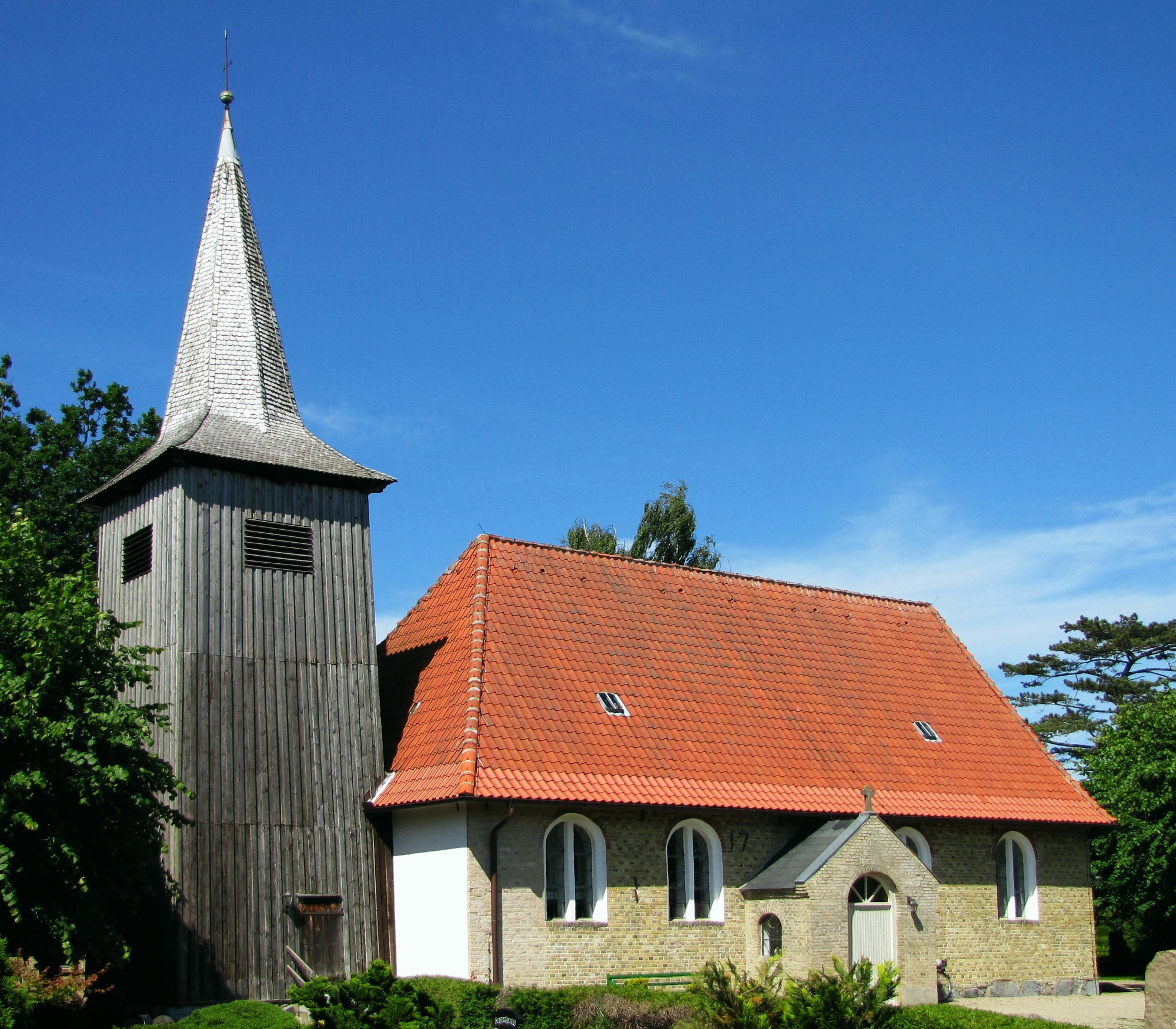 Kulturdenkmal in der Stadt Arnis an der Schlei: die Schifferkirche von 1673 (Südansicht) in Schleswig-Holstein - Foto Wolfgang Pehlemann IMG_8791